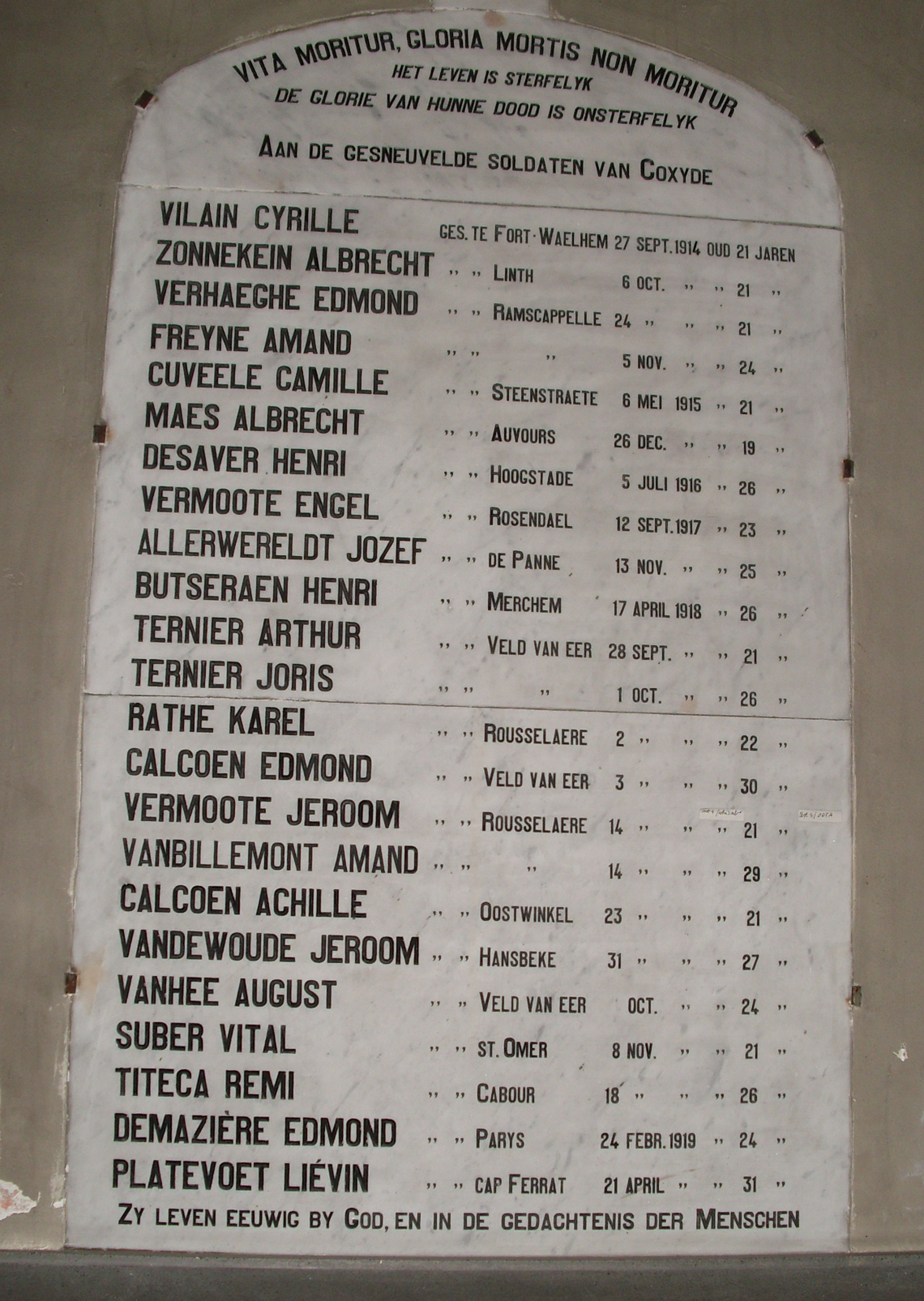 Monument gesneuvelden 1914-1918 - Sint-Pieterskerk van Koksijde - West-Vlaanderen - Vlaanderen - België 19 augustus 2009 Foto: eigen foto Spotter2